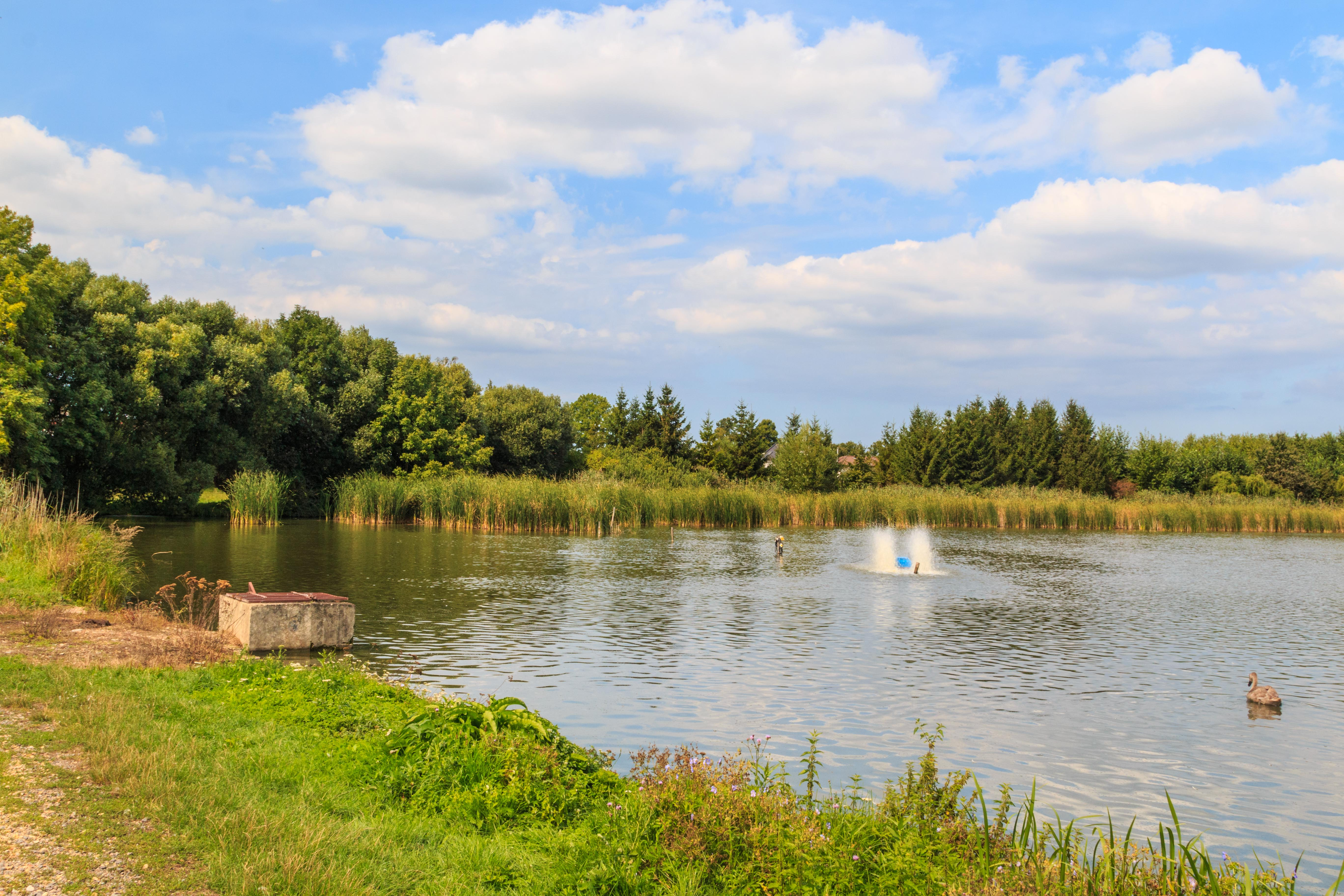 Rybník Rutník u Slatiny u Vysokého Mýta